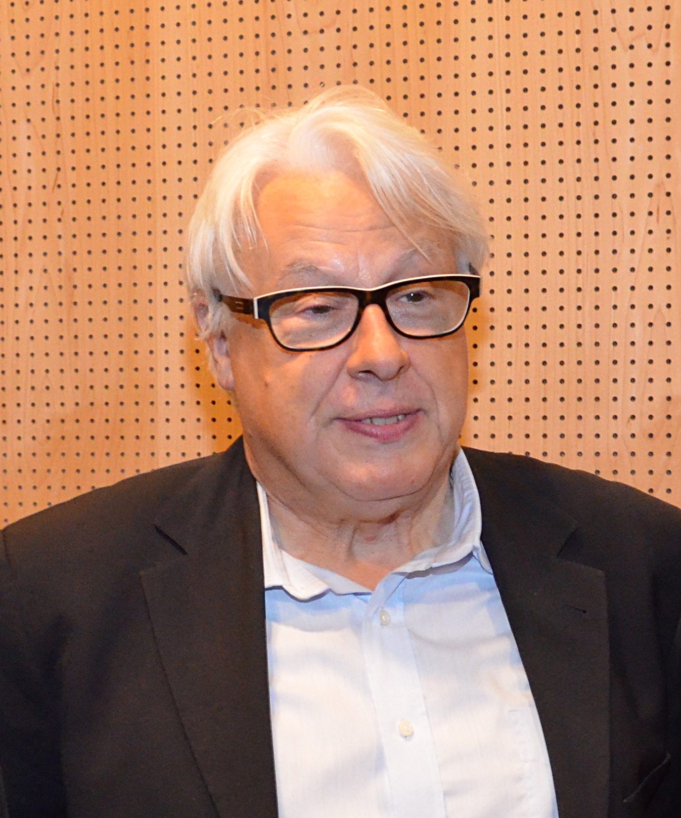 Klaus Kastan, Journalist und Moderator beim Bayerischen Rundfunk